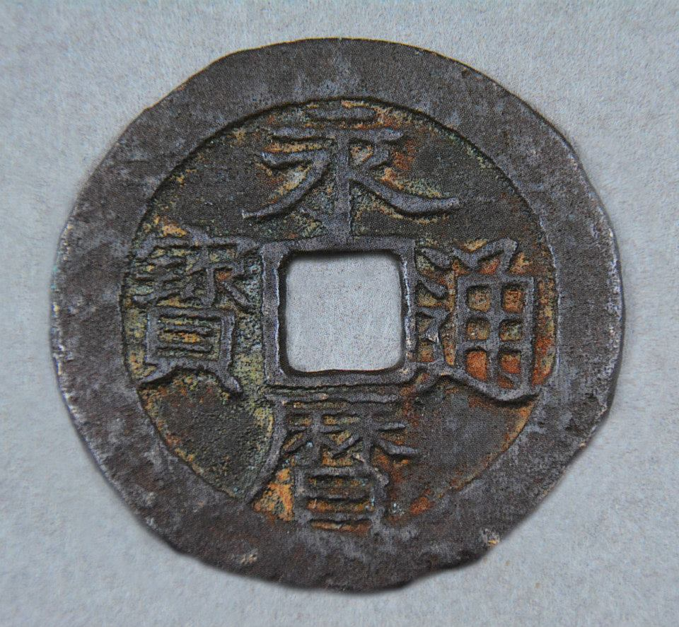 中文（台灣）: 東寧永曆通寶